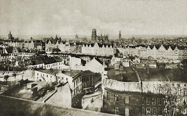 Widok centrum Gdańska z Biskupiej Górki, na pierwszym planie zabudowa Biskupiej Górki.